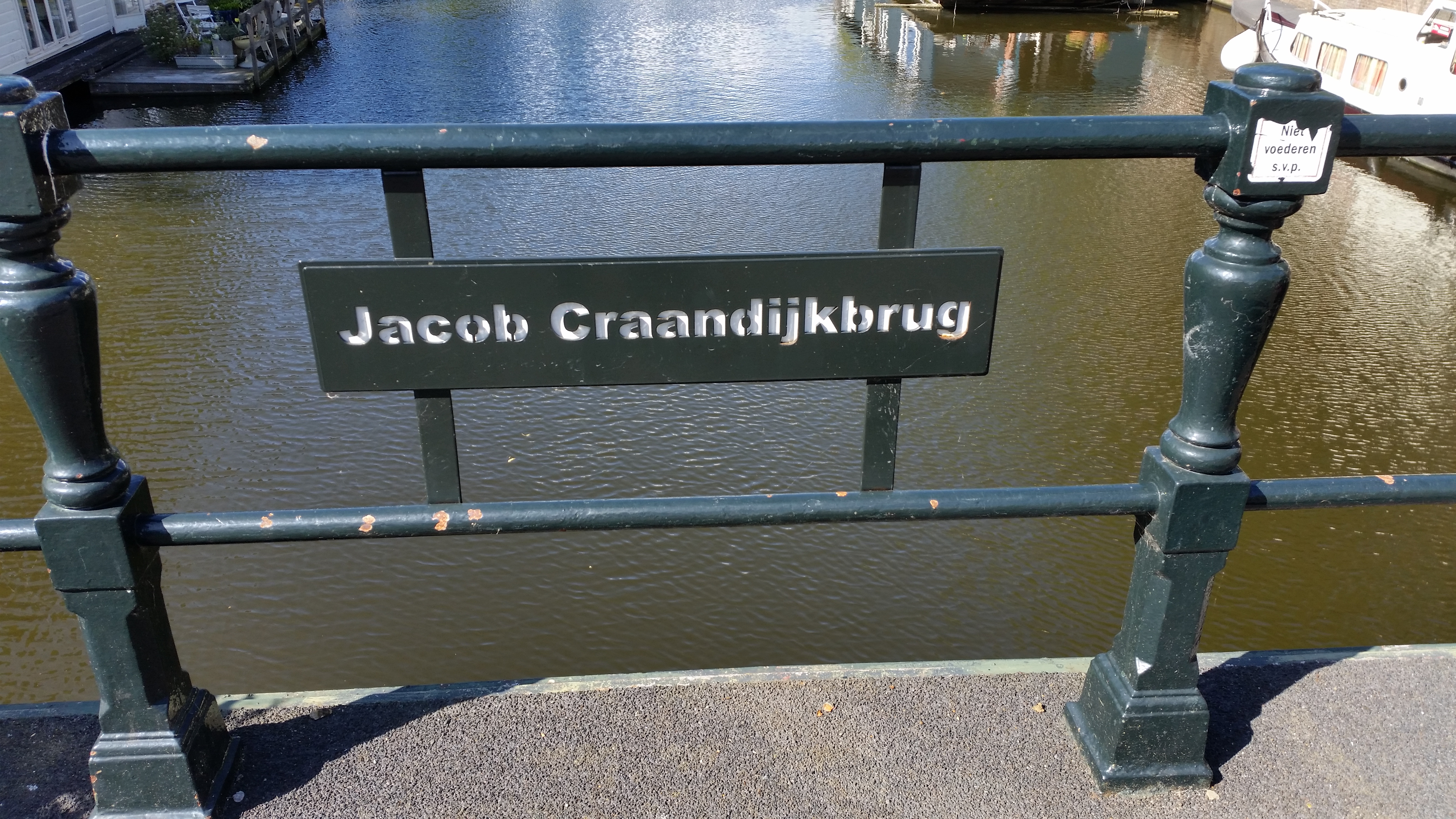 Naamplaat bij Brug 138, Jacobus Craandijkbrug